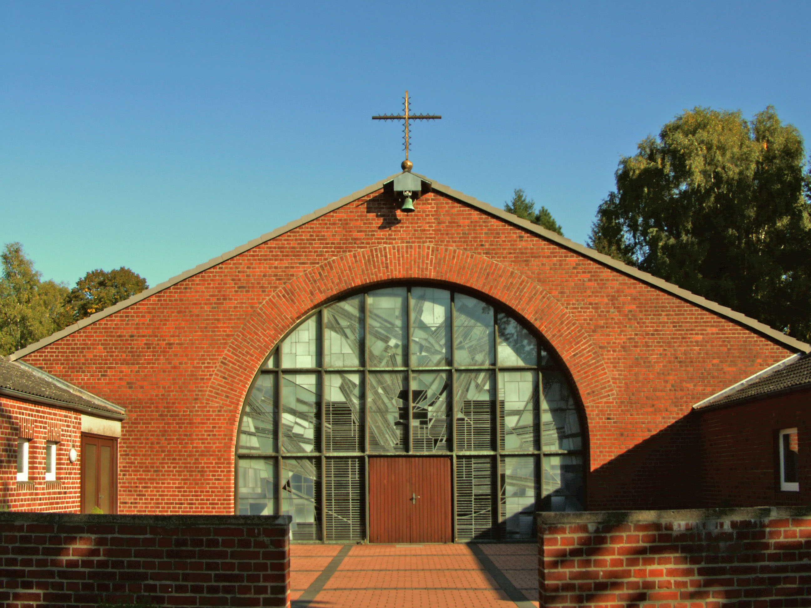 Katholische Kirche St. Bonifatius in Bad Bodenteich, Landkreis Uelzen